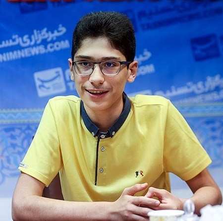 علیرضا فیروزجا در مصاحبه با خبرگزاری تسنیم